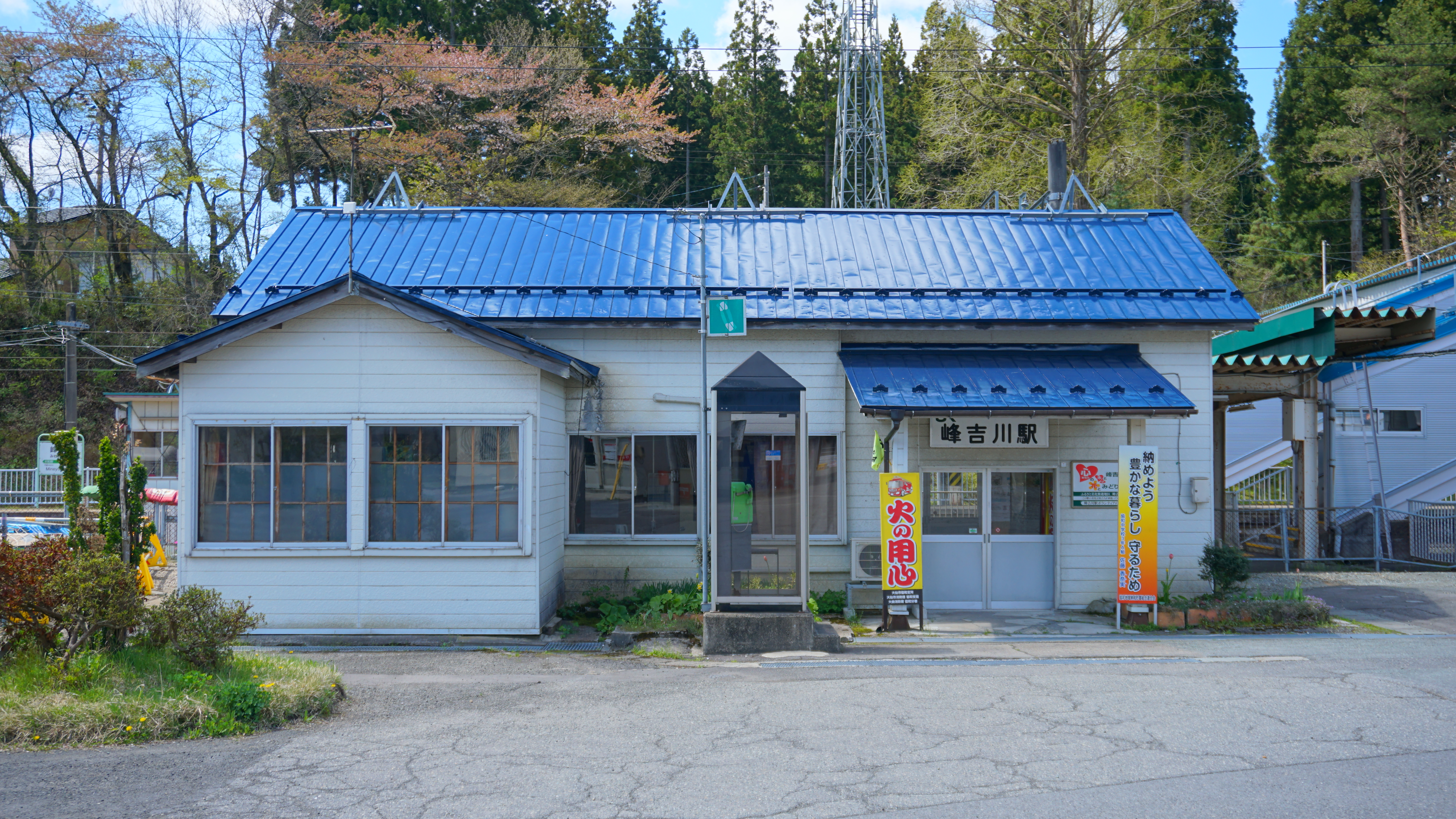 奥羽本線・峰吉川駅（秋田県大仙市）